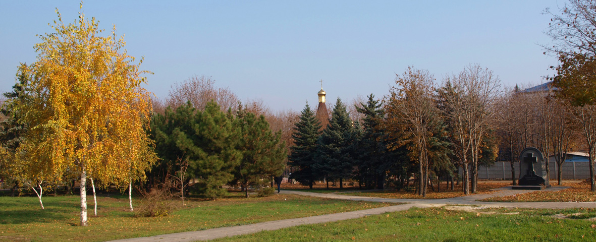 Церковь, памятник жертвам Голодомора